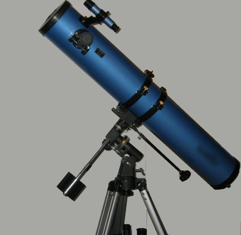 מעמד גרמני נוטט